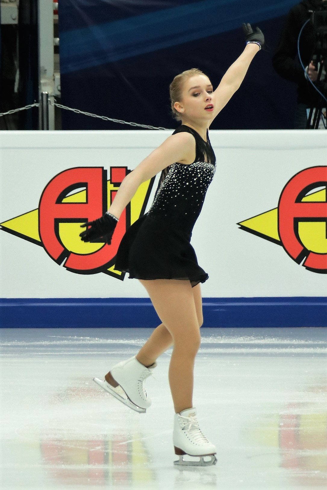 Вивека Линдфорс (Финляндия) на Чемпионате Европы по фигурному катанию 2018.